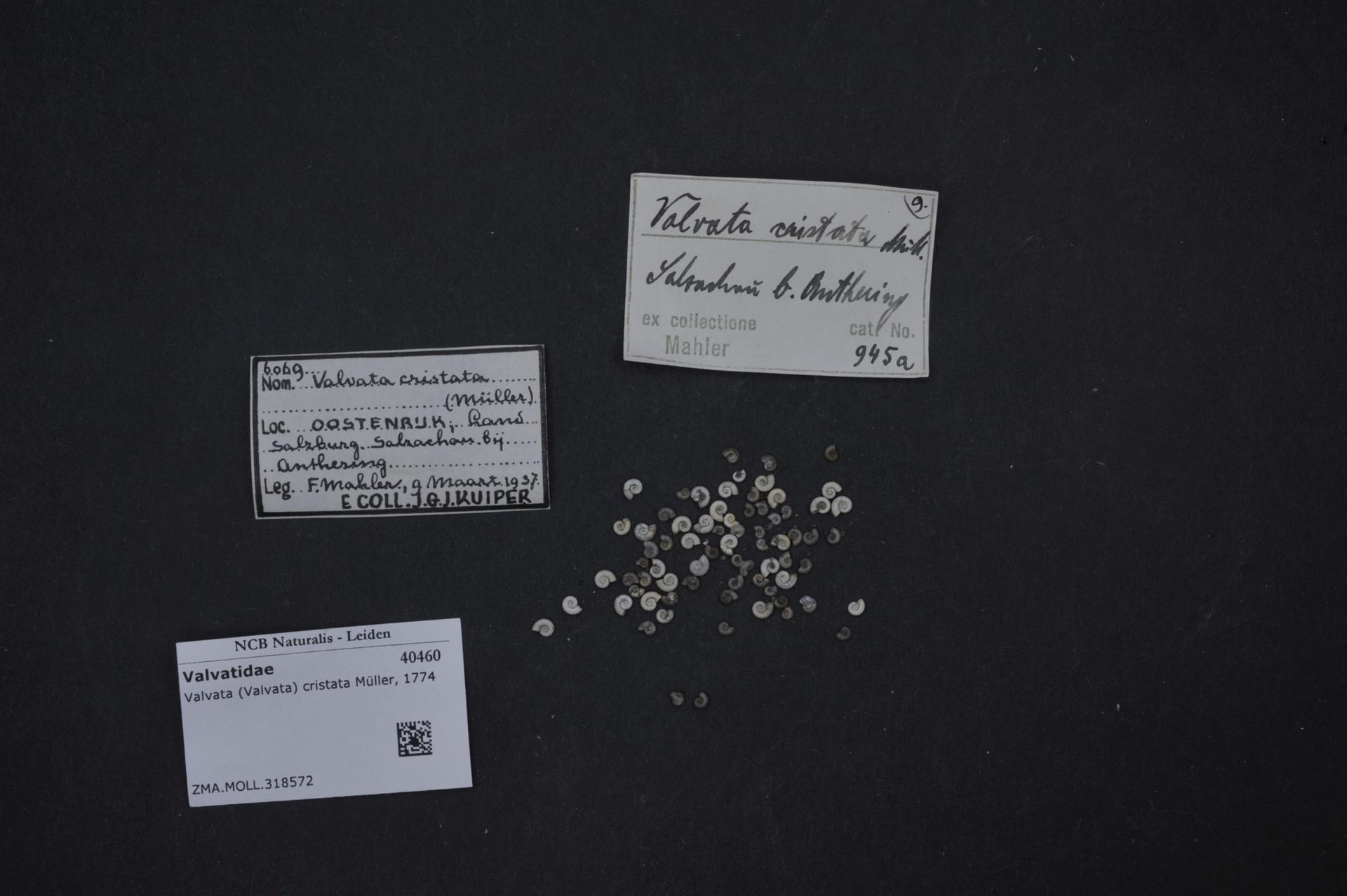 Valvata (Valvata) cristata Müller, 1774